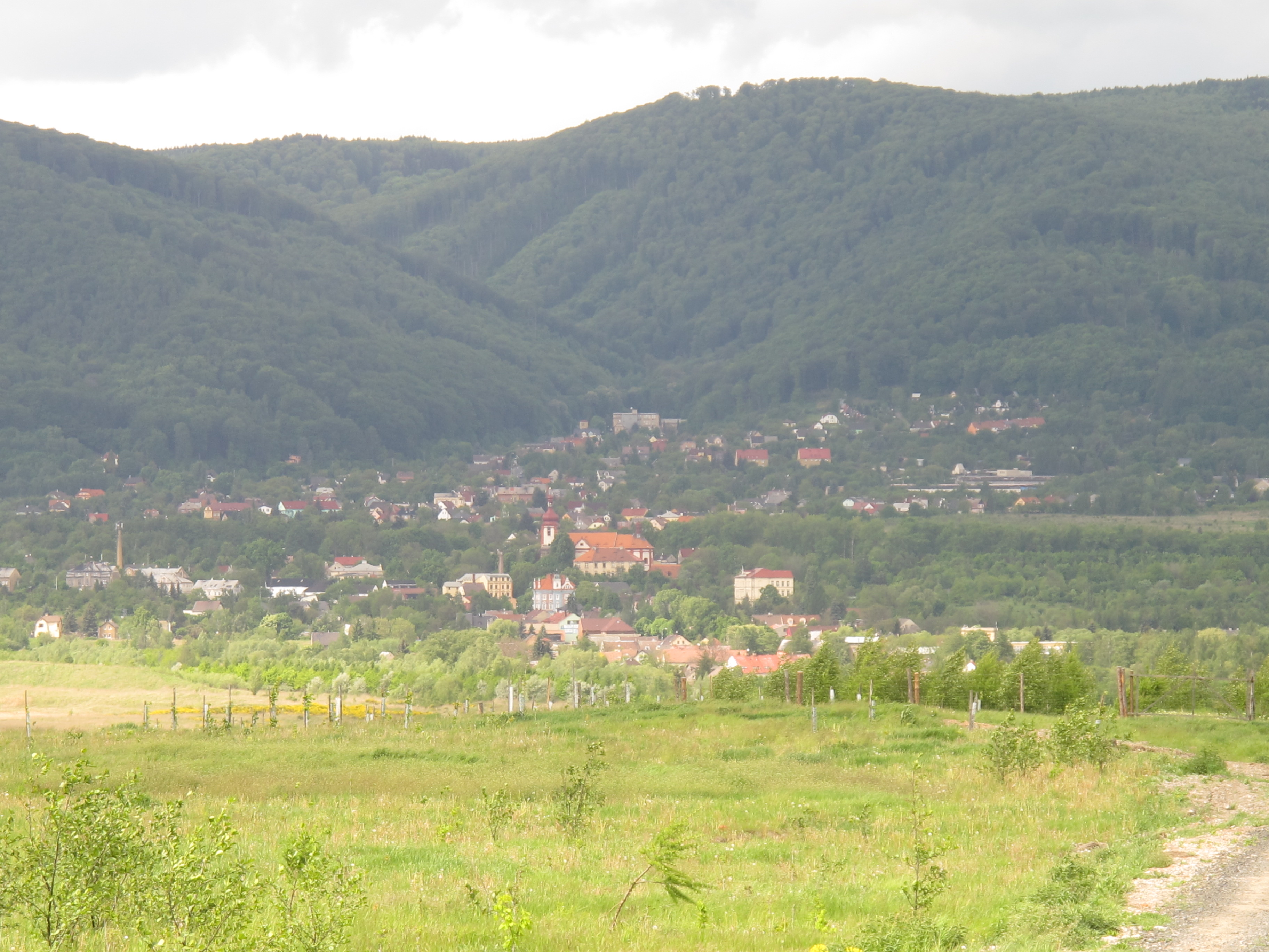 Pohled na Horní Jiřetín